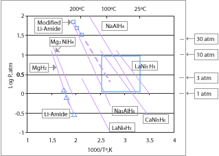 Metal_hydride_hydrogen.storage.graph